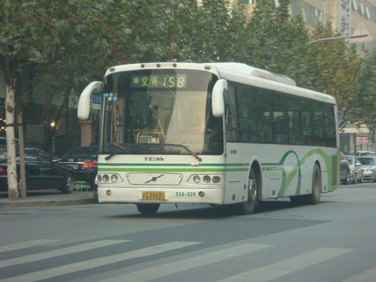 中文（中国大陆）: 上海公交158路，自编号S2A-020，车型SWB6120KHV-3，摄于红宝石路古北路。